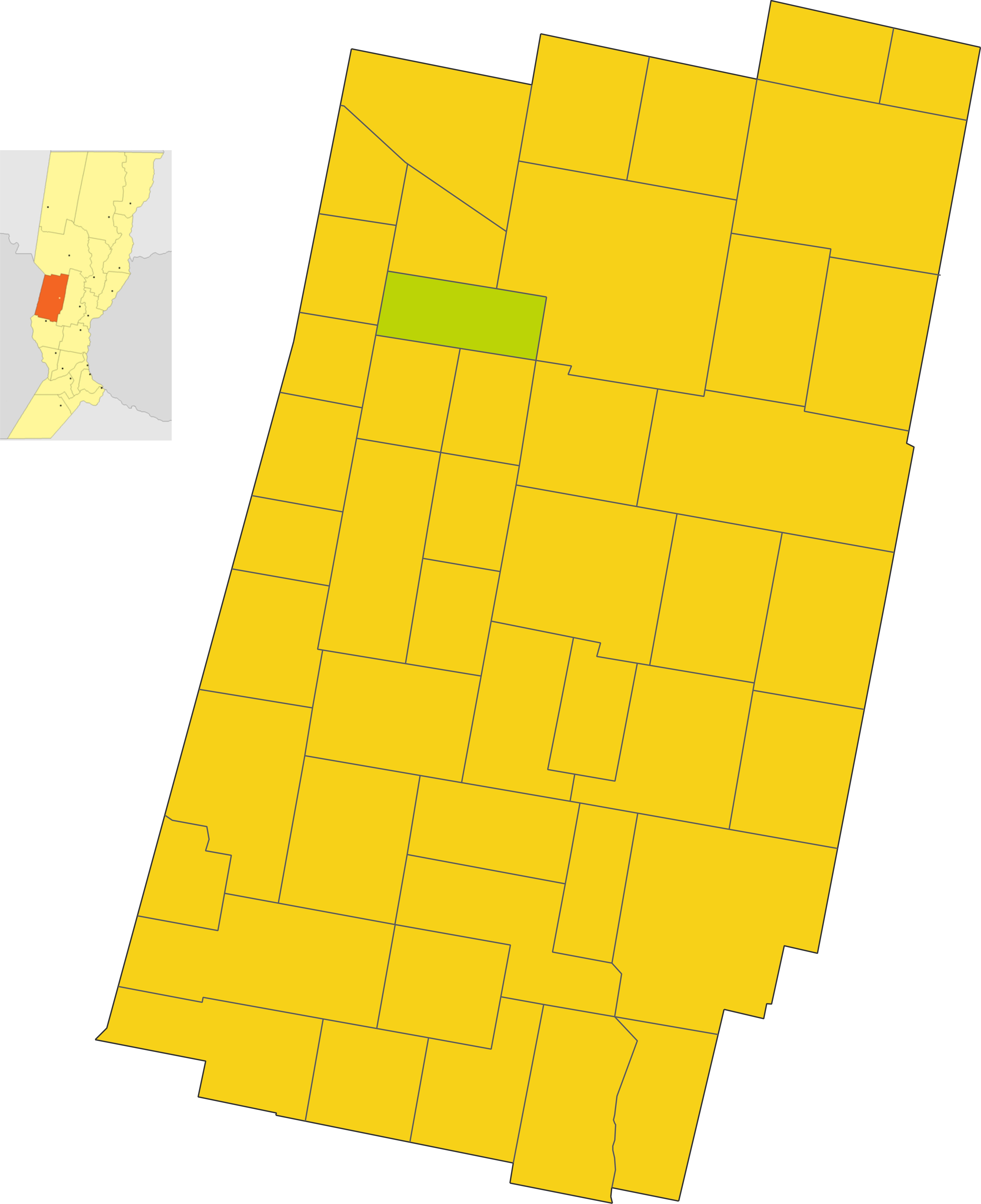 Map of the comuna de Aldao in Castellanos department, Santa Fe province, Argentina